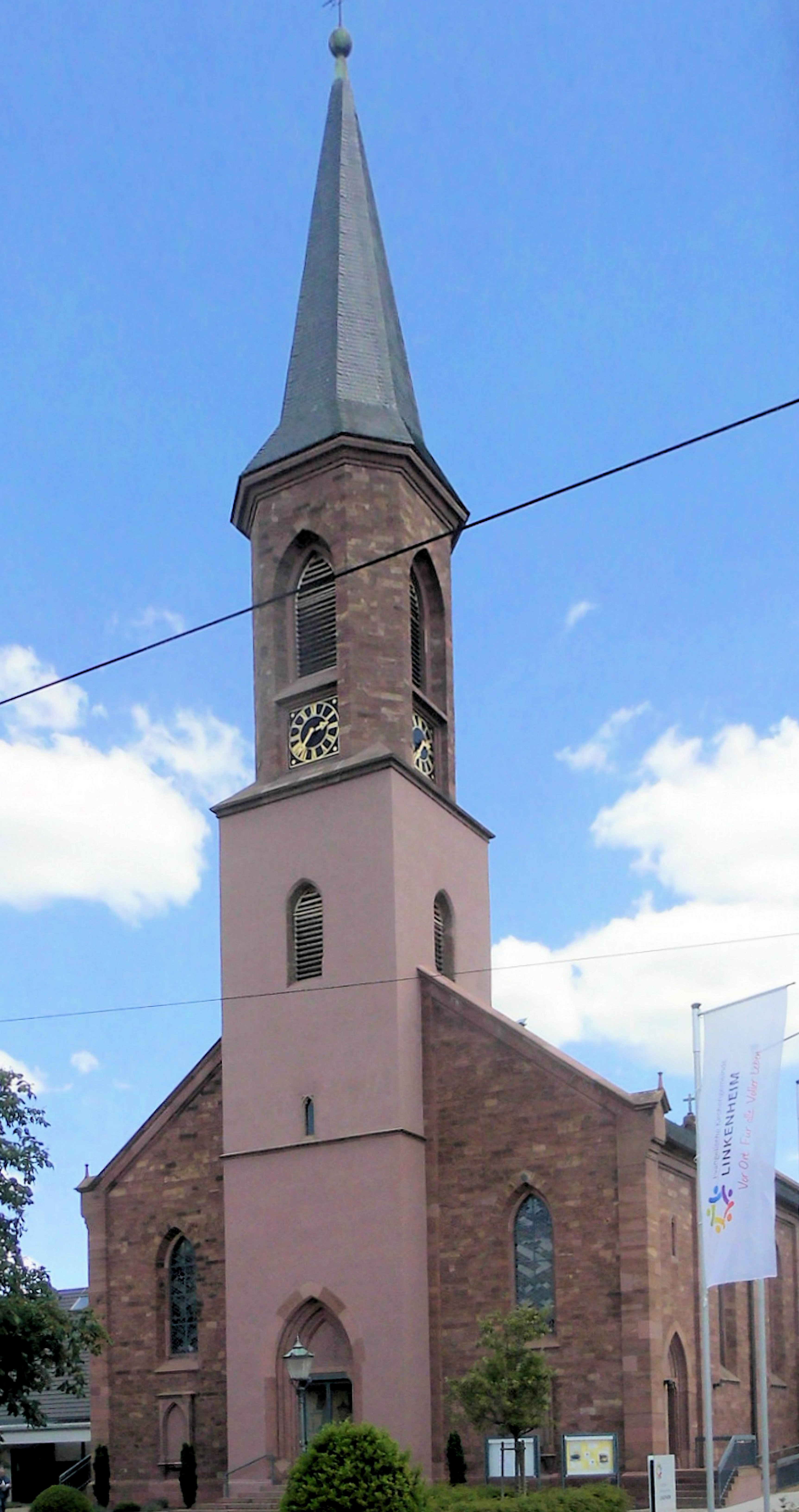 Evangelische Kirche in Linkenheim, Gemeinde Linkenheim-Hochstetten, Deutschland